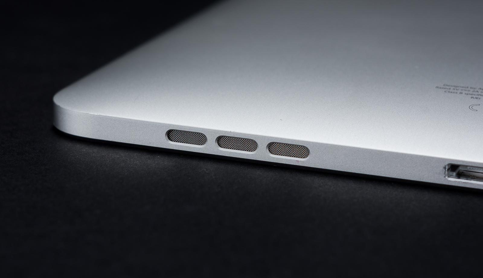 Динамик для воспроизведения музыки на Айфпаде первого поколения.